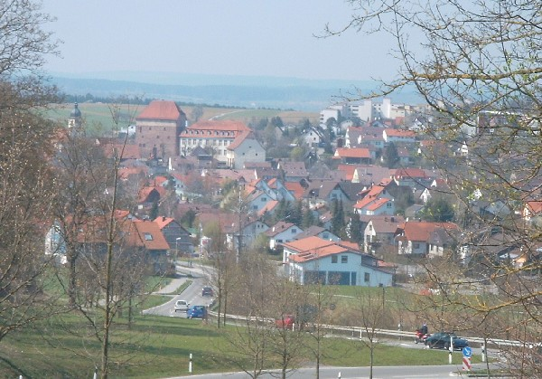 Heimsheim vom Schützenhaus aus fotografiert. Marco Drodofsky